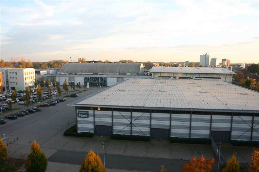 Münster (Westfalen), Halle Münsterland